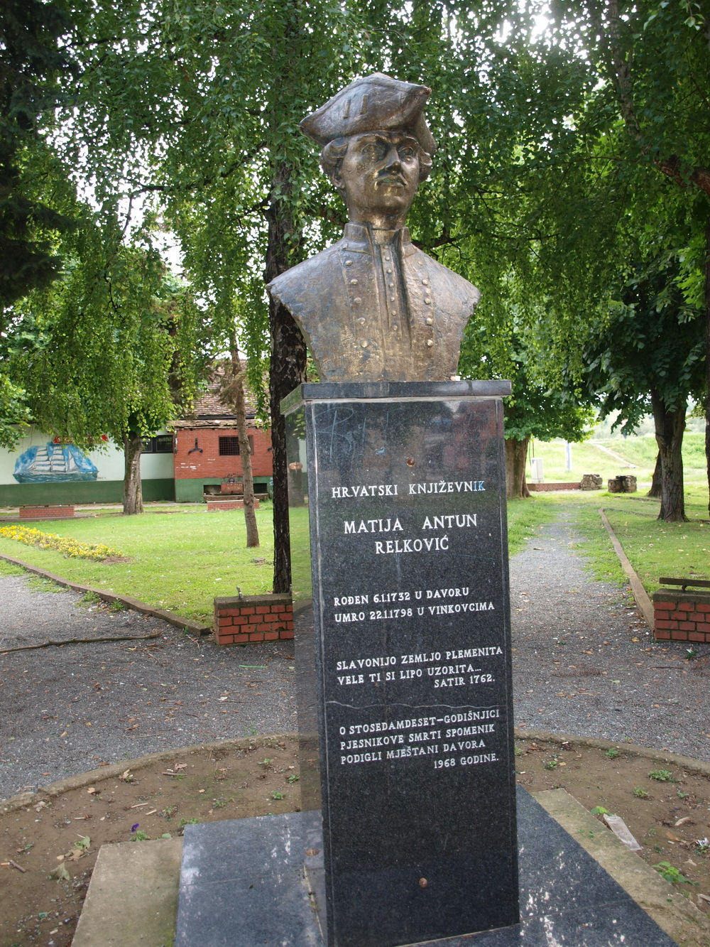 Spomenik Matiji Antunu Reljkoviću u naselju Davor u Brodsko-posavskoj županiji.